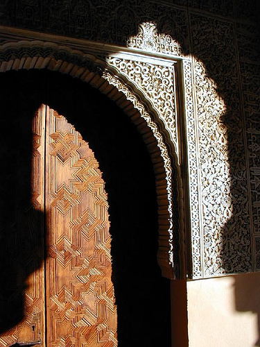 Alhambra, Granada, Spain.The Moor's tears - Alhambra Palaces & Gardens, Granada, Spain